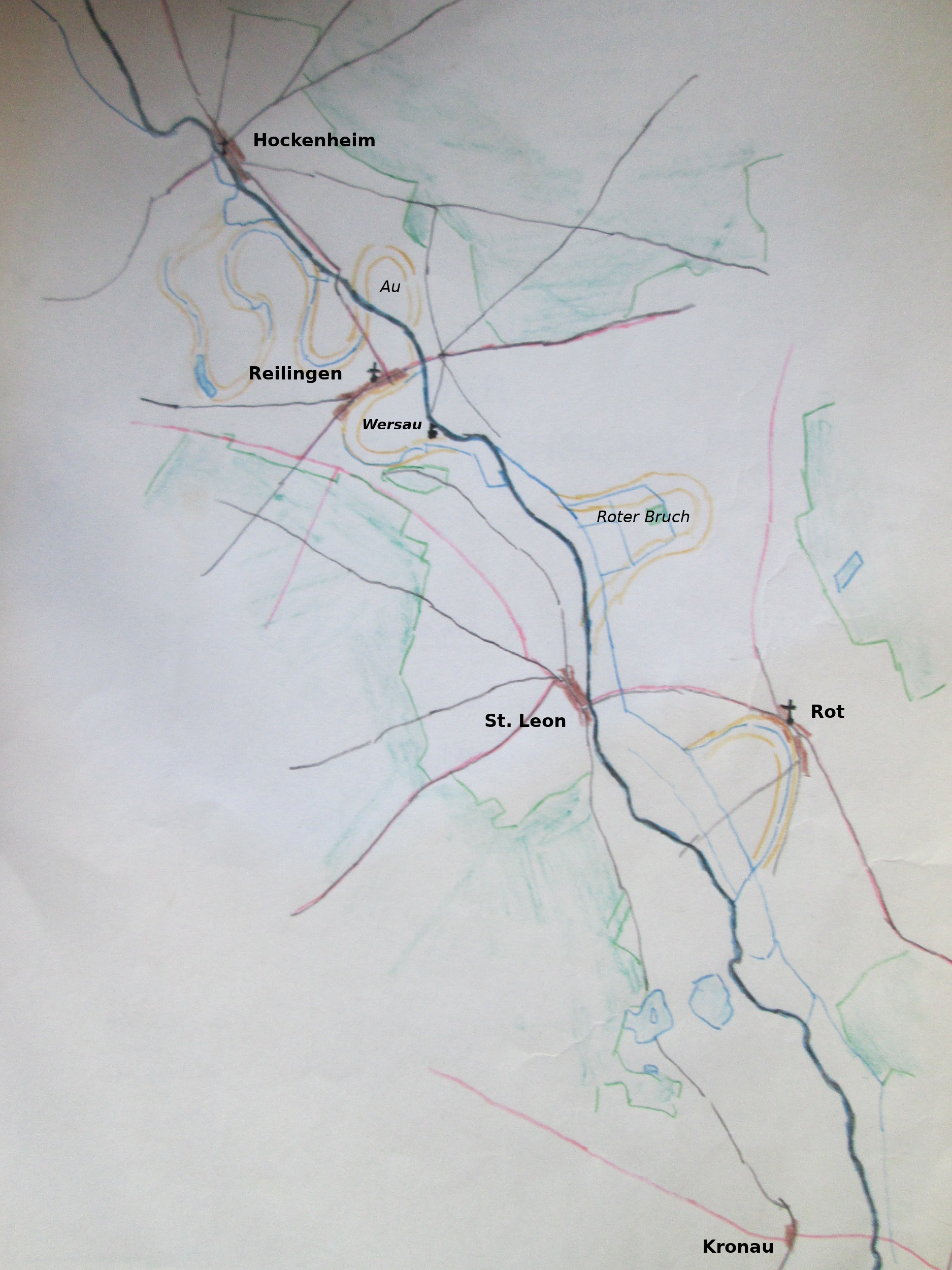 Karte der Kraichbach-Mäander zwischen Hockenheim, Reilingen, St. Leon-Rot und Kronau